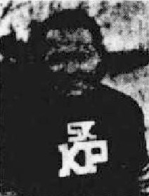 Ervin Šima (1910-1987), český fotbalový útočník a trenér